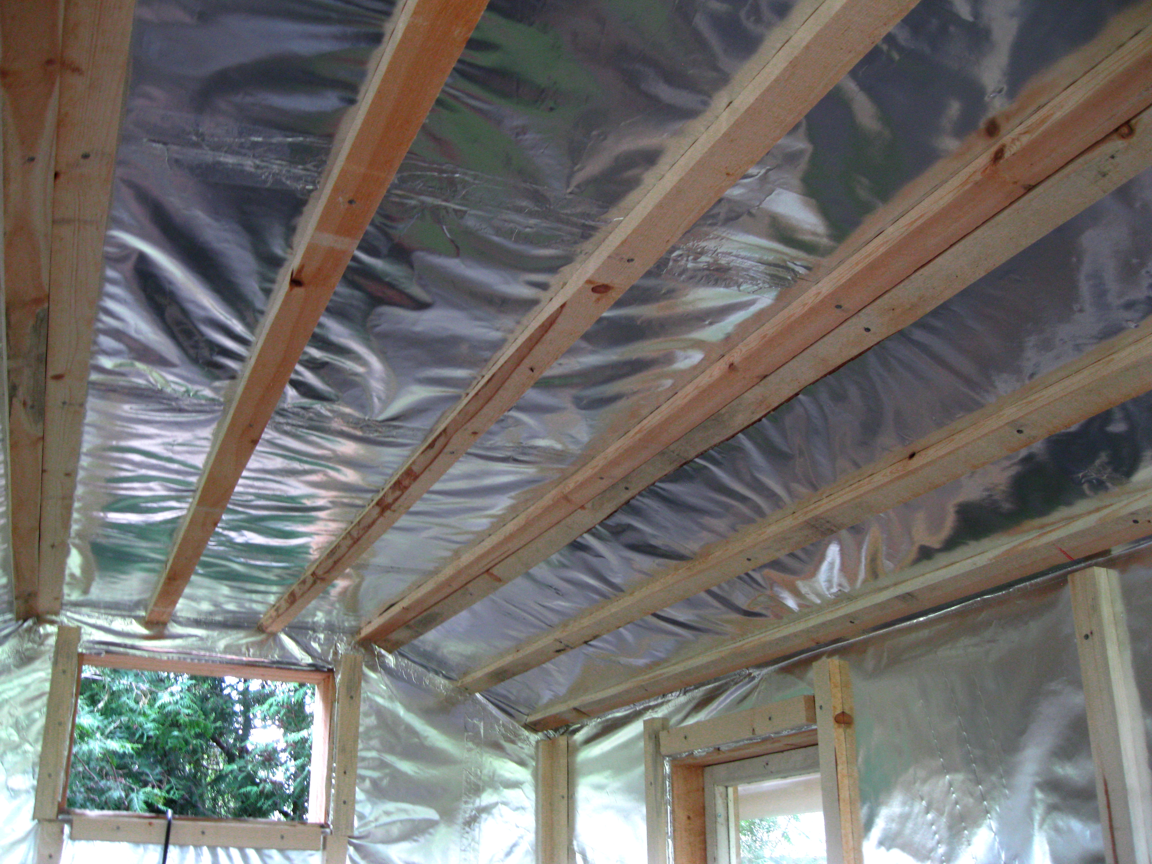 Alumiinipaperia saunan eristeenä.